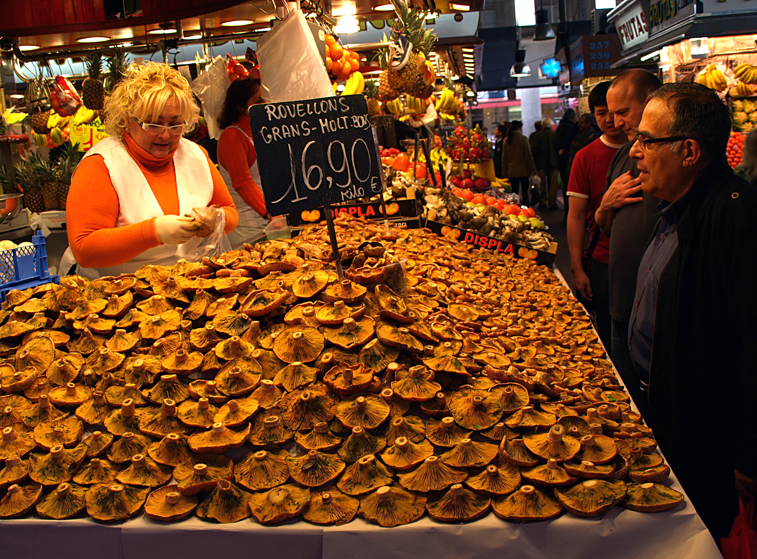 Mercat de la Boqueria